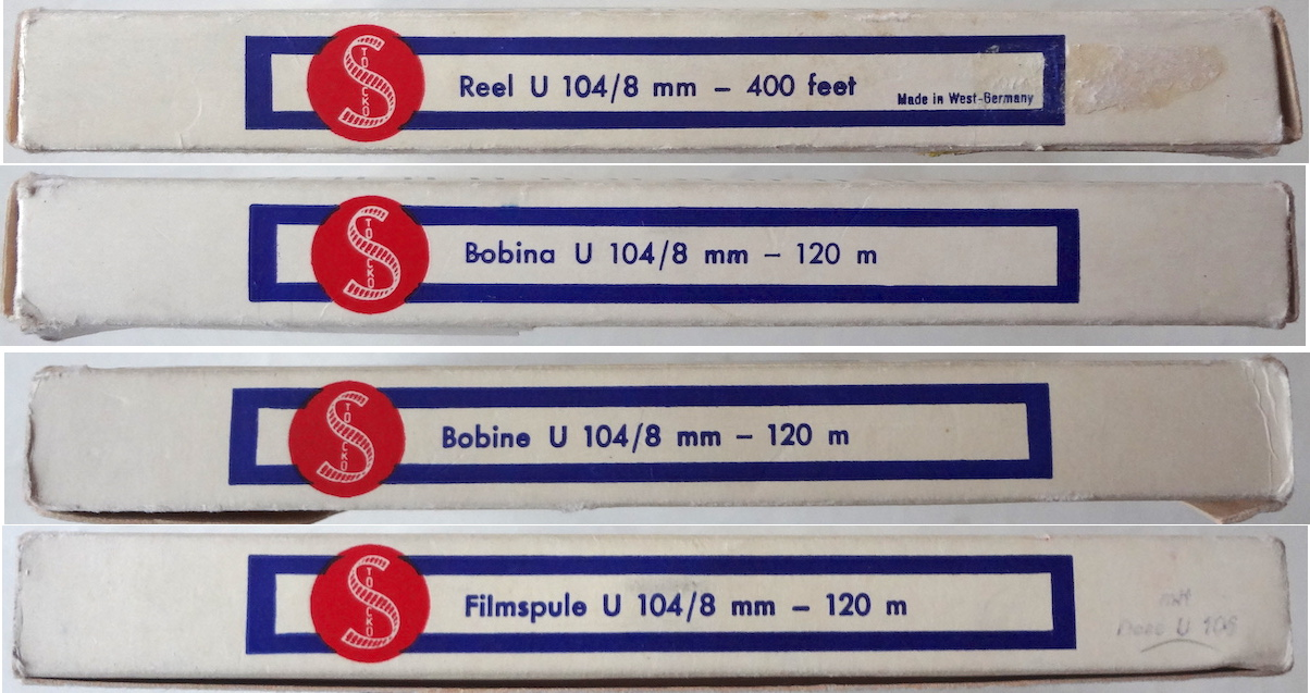 Boîte pour film 8mm, marque « Stocko », années 1960. Vue des quatre côtés avec des étiquettes rédigées en anglais, italien, français et allemand.